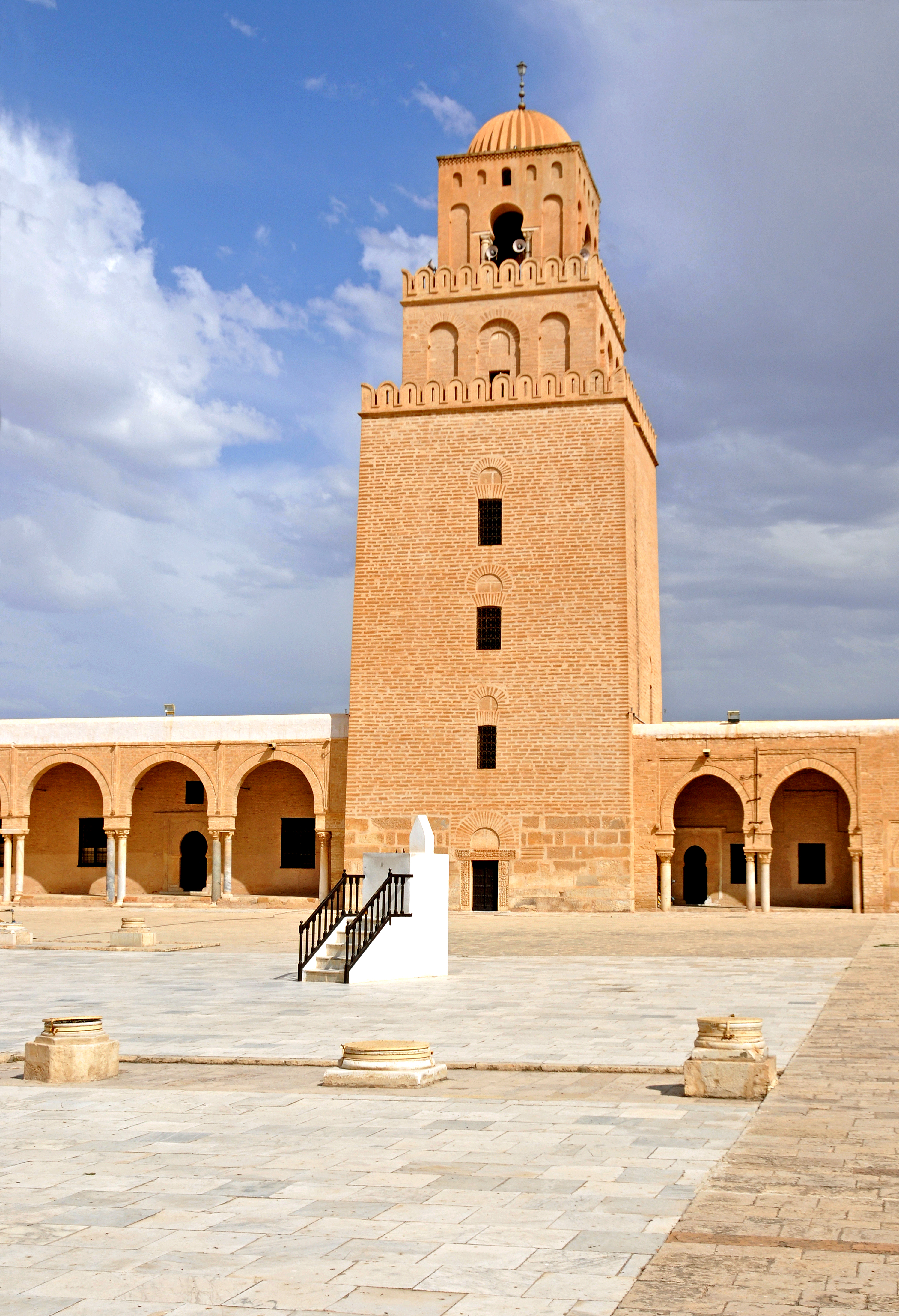 Vue du minaret et d'une partie de la cour de la Grande Mosquée de Kairouan, en Tunisie. Cette mosquée est l'un des édifices les plus anciens et les plus importants de l'architecture islamique.